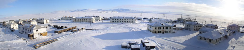 Панорама Апапельгино